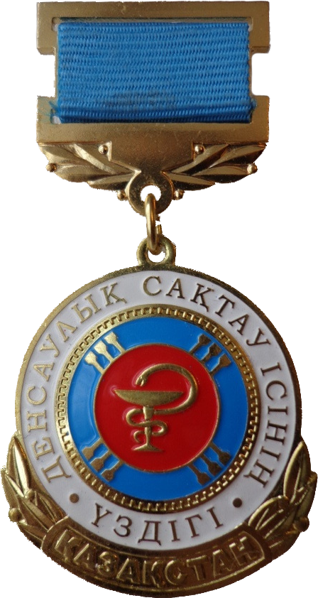 Нагрудный знак "Отличник здравоохранения Республики Казахстан"